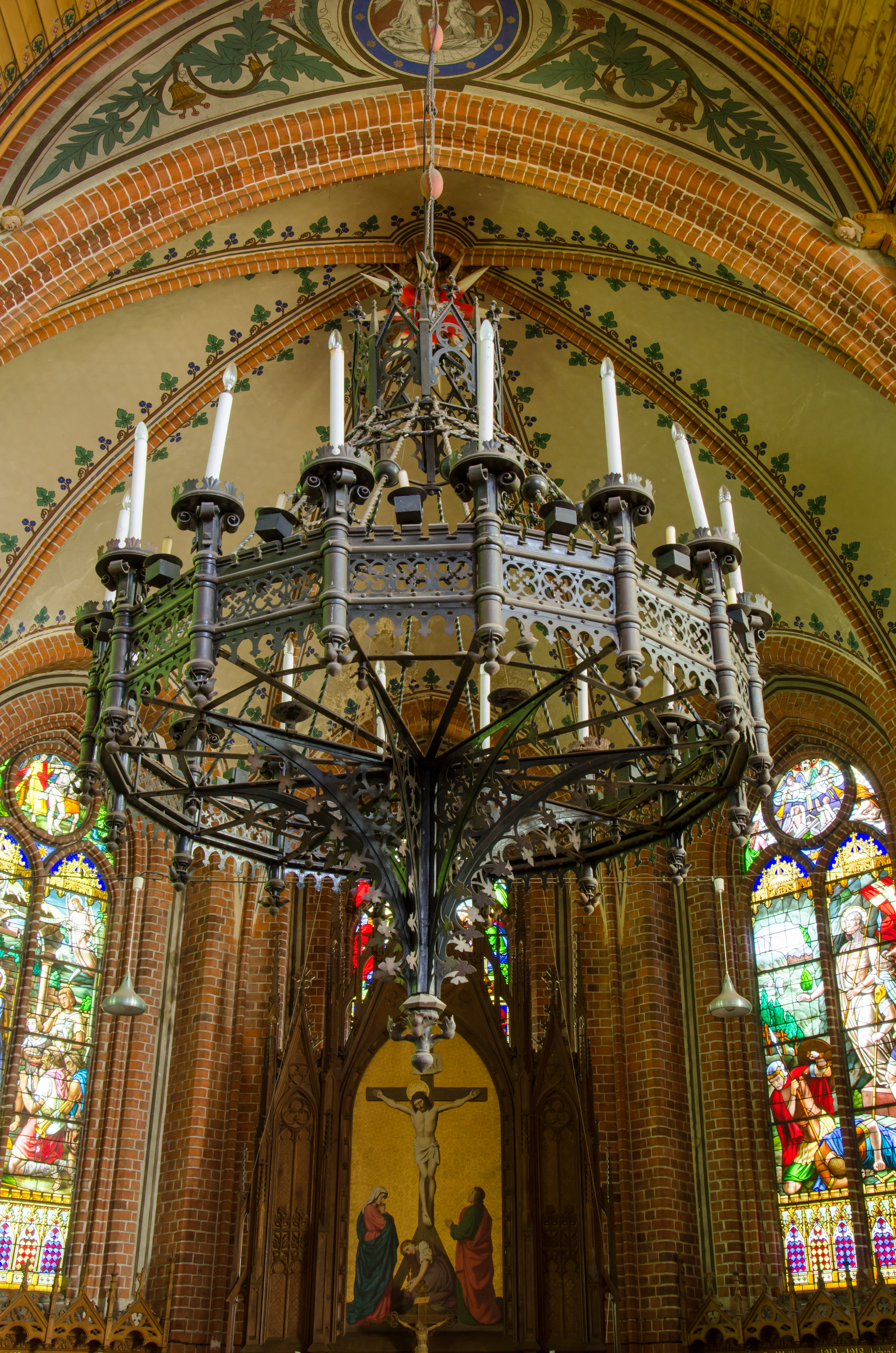 Malchow Stadtkirche Leuchter